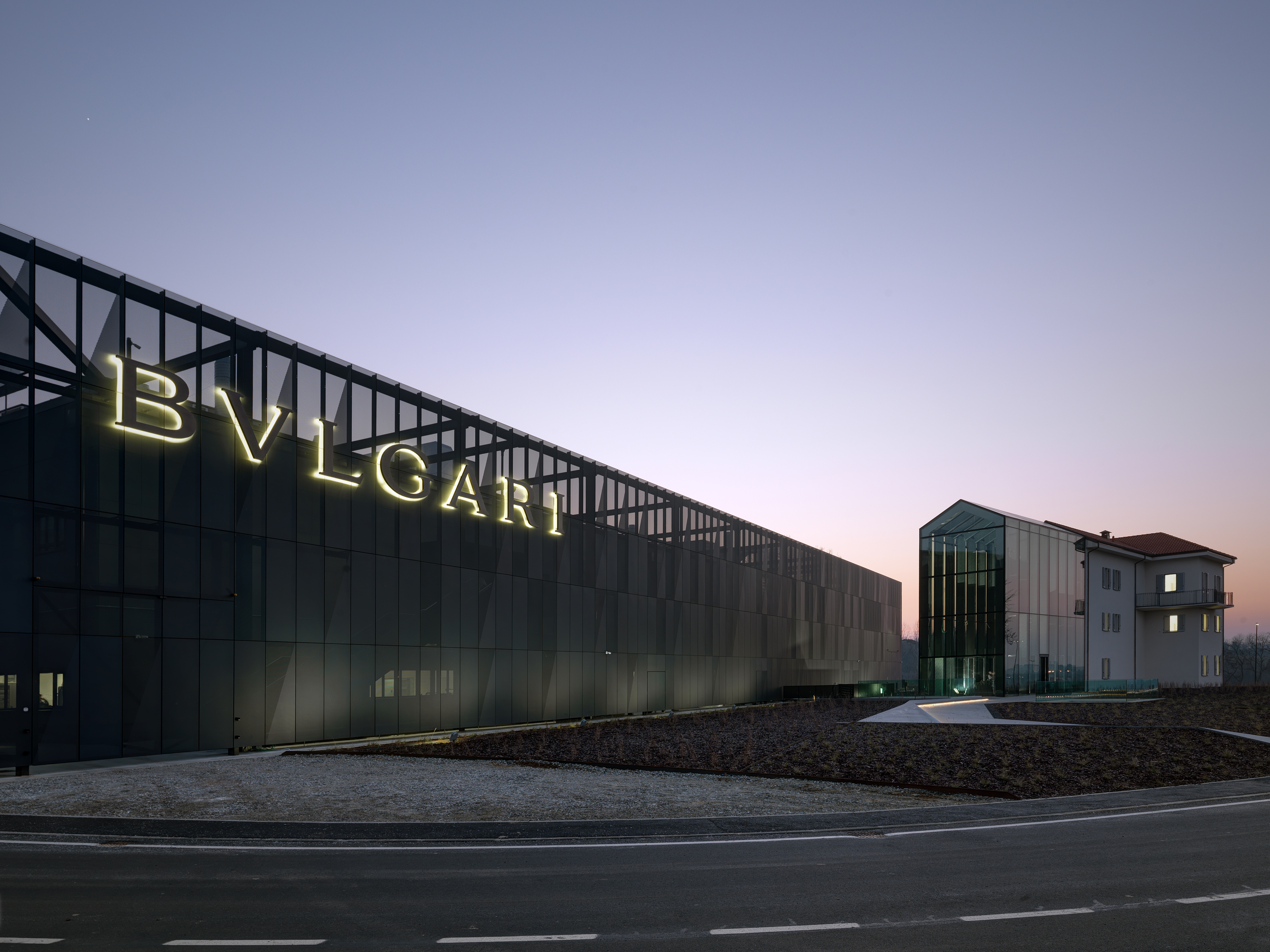 Vista serale della Manifattura